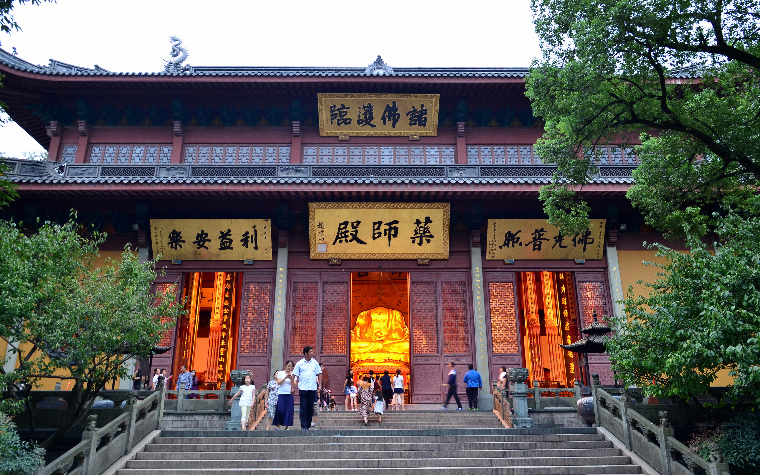 灵隐寺药师殿，供奉“东方三圣”（药师佛与日光菩萨、月光菩萨）。